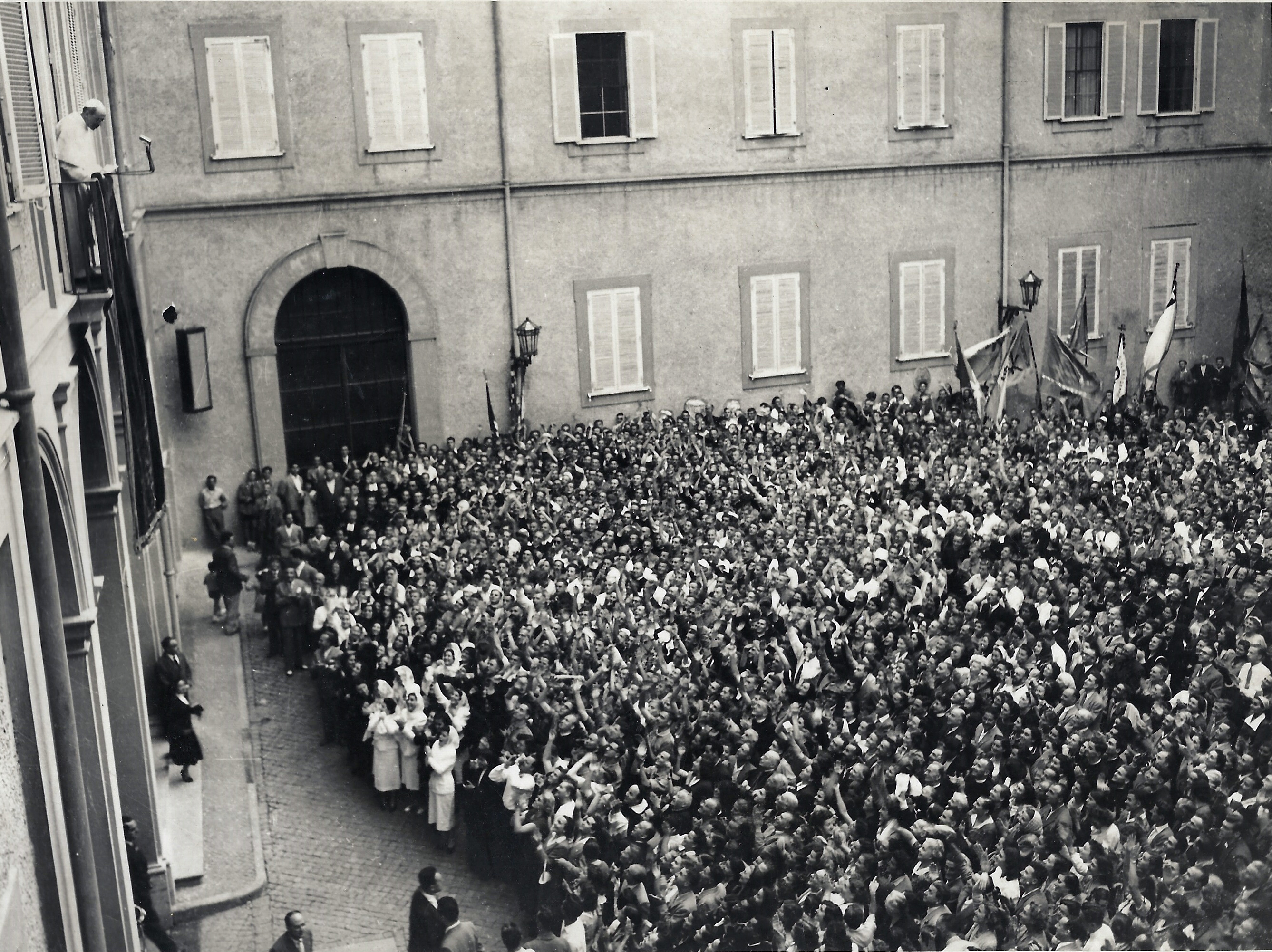 Ter gelegenheid van het Heilig Jaar 1950 worden ettelijke honderden KSA-leden in audiëntie ontvangen door paus Pius XII op zijn zomerresidentie in Castelgandolfo.